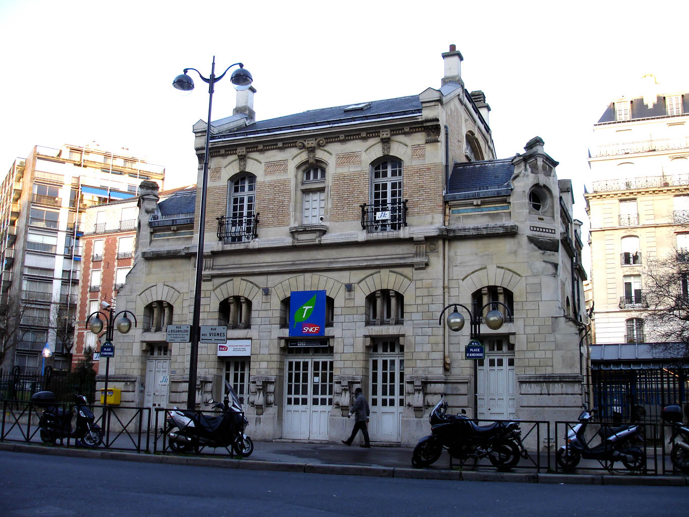 Paris - Gare de Boulainvilliers (ligne C du RER). Photo personnelle (own work) de Clicsouris.